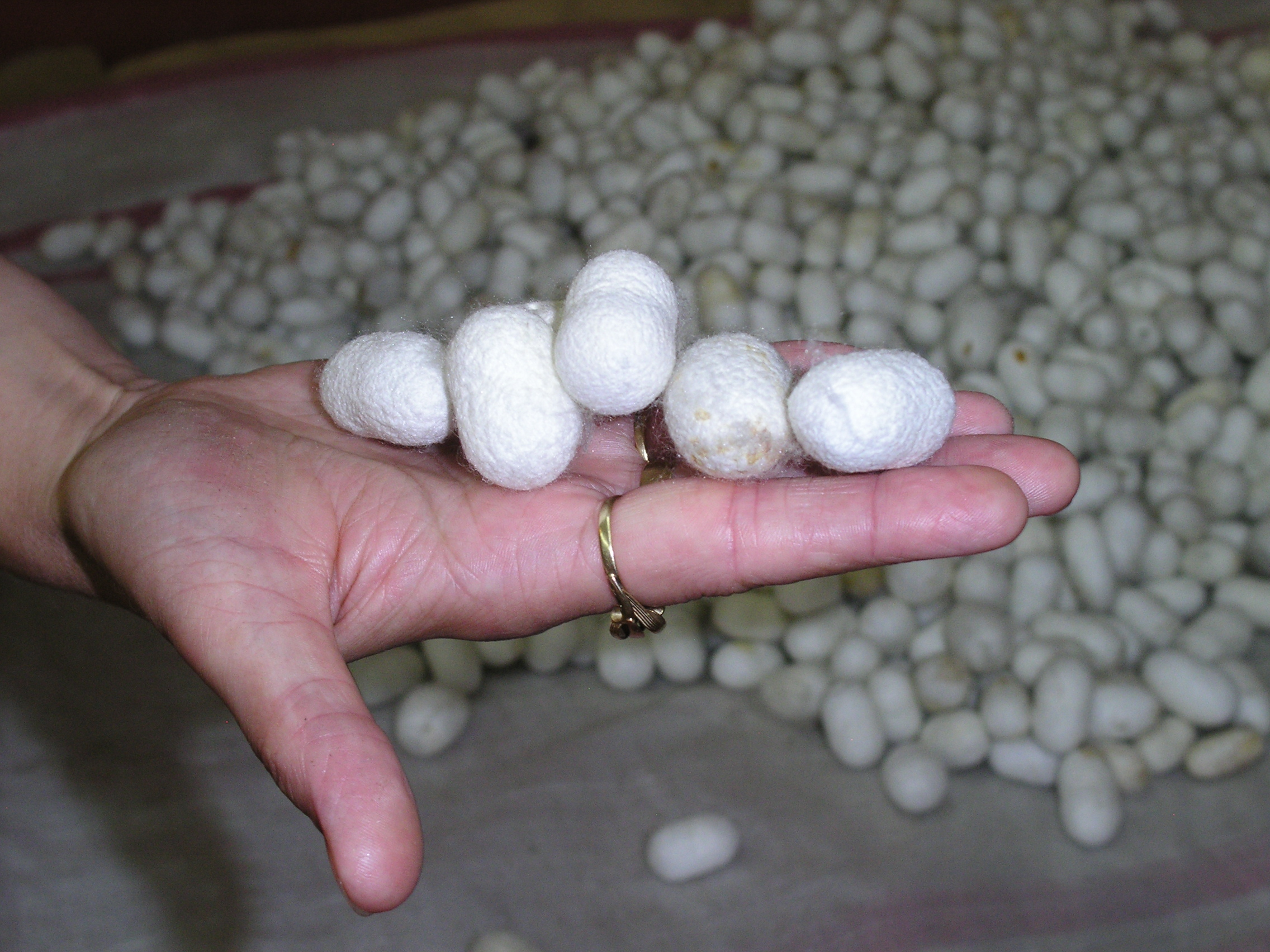 Kukly Bource morušového.